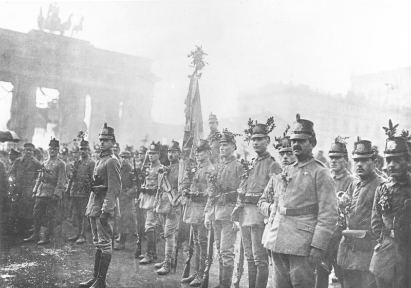 Berlin, Rückkehr der Fronttruppen Scherl: I. Weltkrieg 1914-1918 Rückmarsch; Einzug der Fronttruppen in Berlin 1918; Gardeschützen vor dem Brandenburger Tor. 11249-18